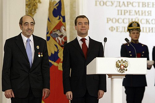 Дмитрий Медведев, Алексей Фридман. Церемония вручения Государственных премий Российской Федерации